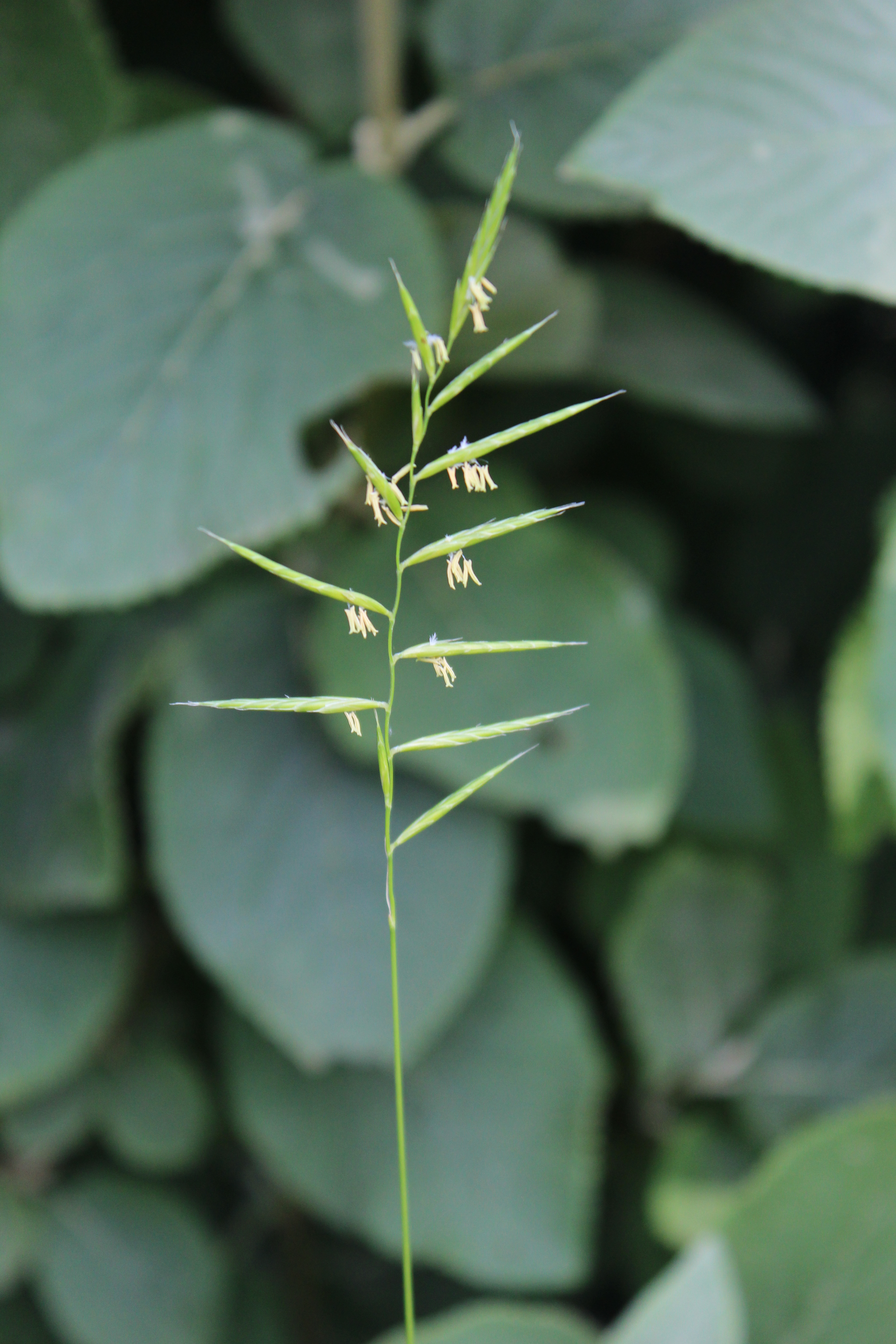 Brachypodium pinnatum en fleurs